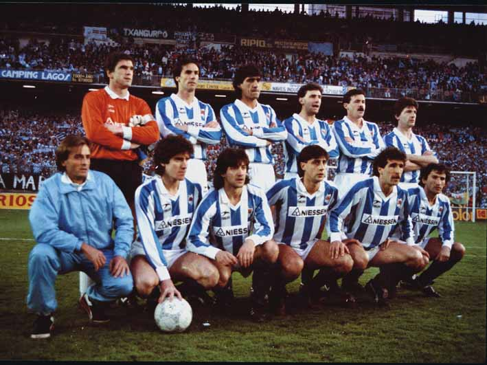 Real Sociedaden talde titularra 1988-1989 denboraldian, kamiseten Niessen erakuslearekin.